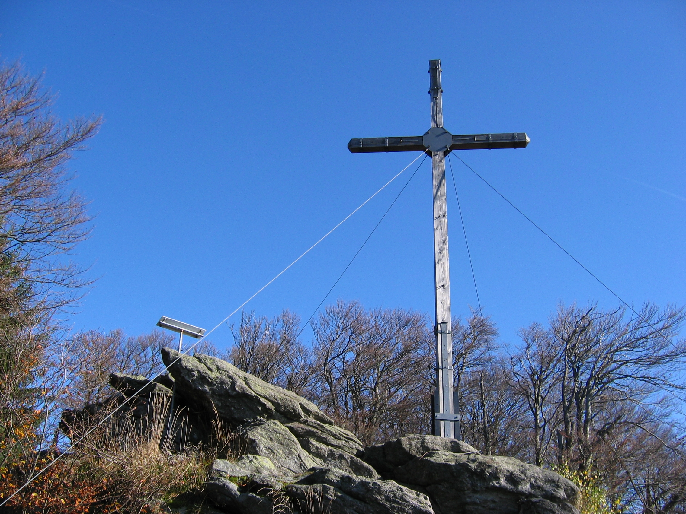 Gipfel Dreitannenriegel